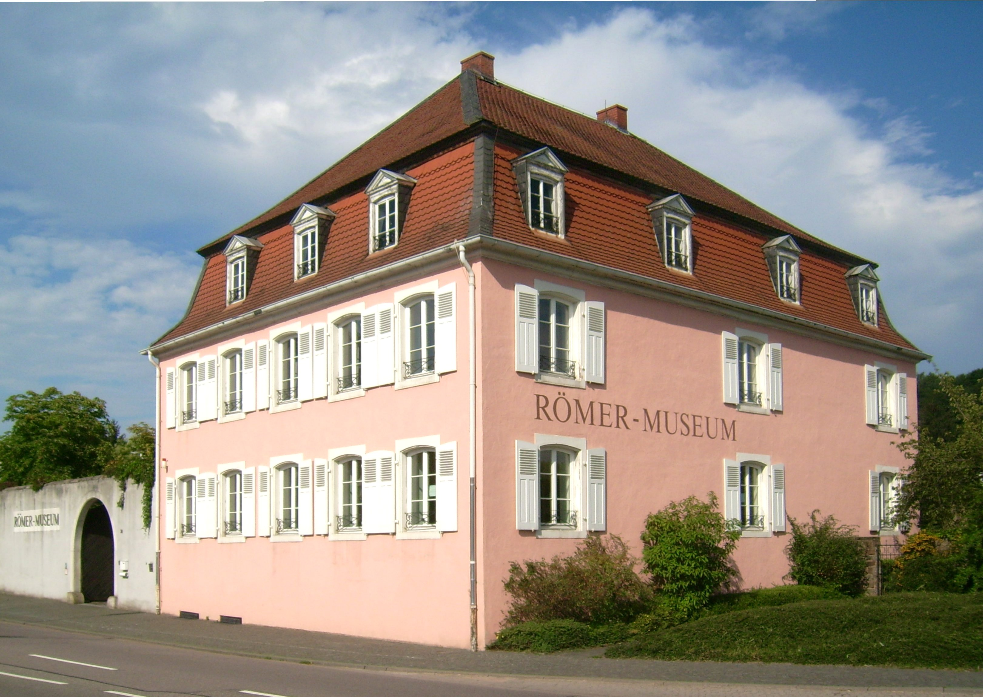 Edelhaus in Schwarzenacker; entworfen von Jonas Eriksson Sundahl